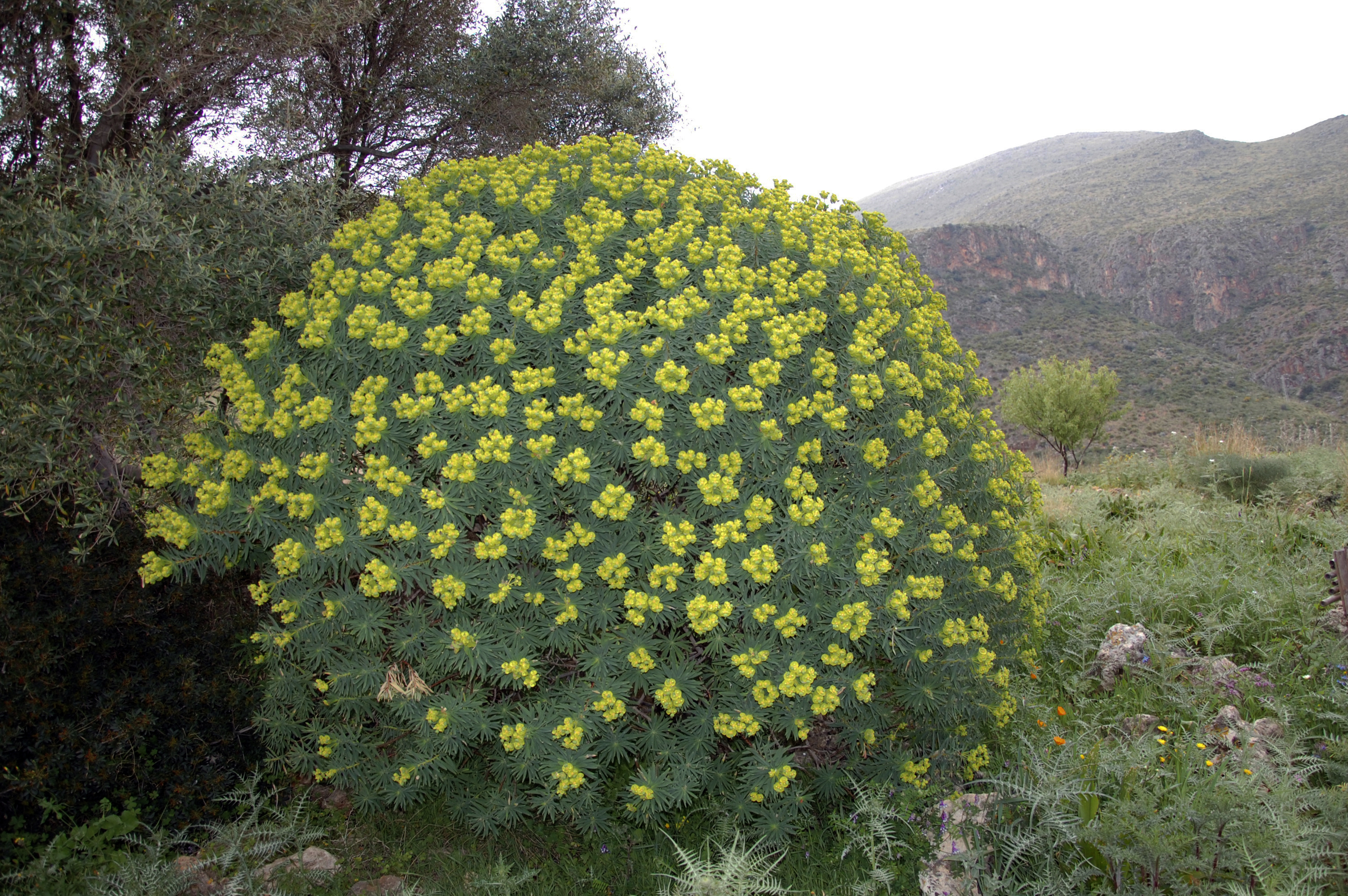 Euphorbia dendroides Zingaro, Sicily